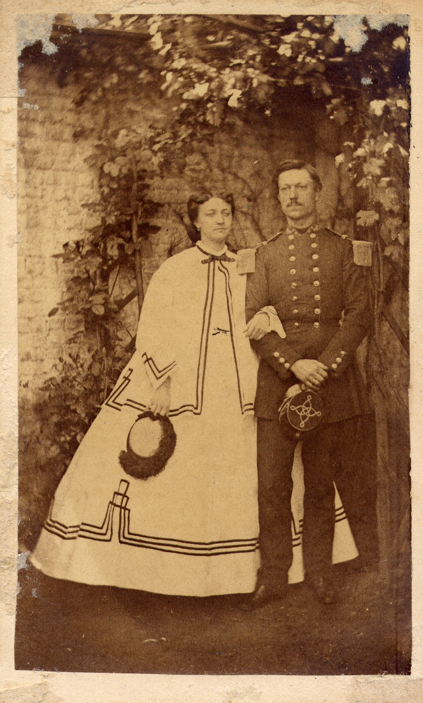 Joséphine Straatman en compagnie de son mari le futur général Rouen. Joséphine (José) Pétronelle STRAATMAN, née le 15 avril 1842, épousa à Bruxelles le 30 avril 1862 Charles Auguste Jean Baptiste ROUEN, lieutenant-général des grenadiers et historien militaire, né à Anvers le 9 juillet 1838, auteur d’un livre réputé: L’Armée Belge. Exposé historique de son organisation, de ses costumes et uniformes, de son armement et de sa tactique depuis les temps primitifs jusqu’à nos jours, Bruxelles, Lyon-Claesen, 1896, fils de Guillaume, capitaine au 6ème régiment de ligne, ancien cadet aux hussards de Croy, et d’Henriette Elius. Ils eurent : Marguerite Rouen, née le 13 nov. 1869, épousa le 16 juin 1892, Henri Mathieu, auditeur militaire des provinces de Brabant et de Hainaut. Dont deux fils: Henry-Paul Mathieu, docteur en droit, attaché au Ministère de la Justice. Dr. Mathieu, docteur en médecine, épousa N.